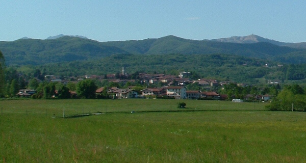 Veduta di Oleggio Castello e Paruzzaro, Novara, Italy